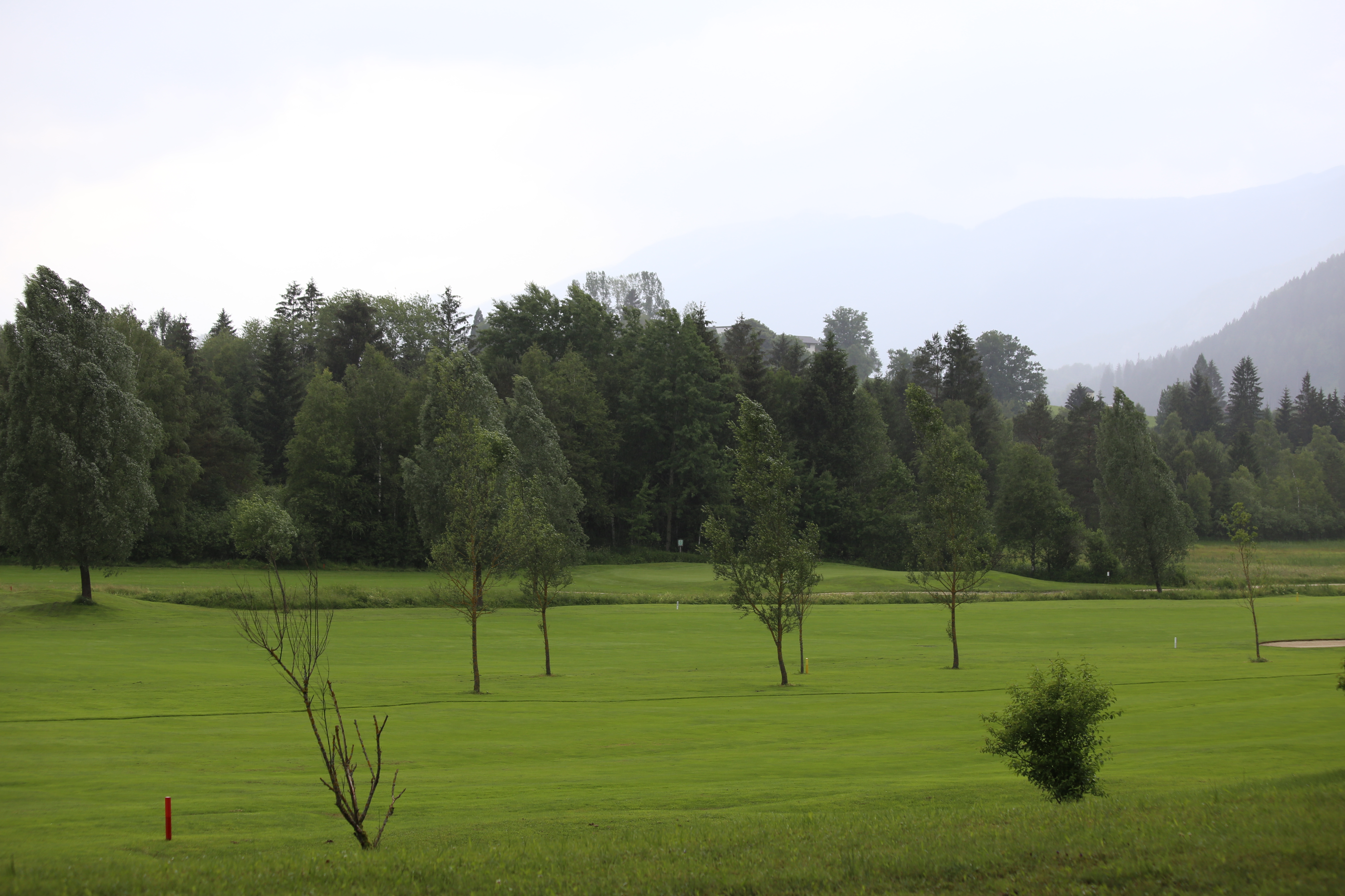 Das Edlbacher Moor ist eingerahmt von einem Golfplatz und daher eher unzugänglich. This media shows the nature reserve in Upper Austria with the ID n064.